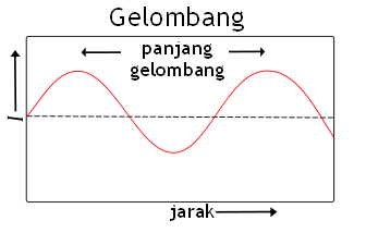 Panjang gelombang